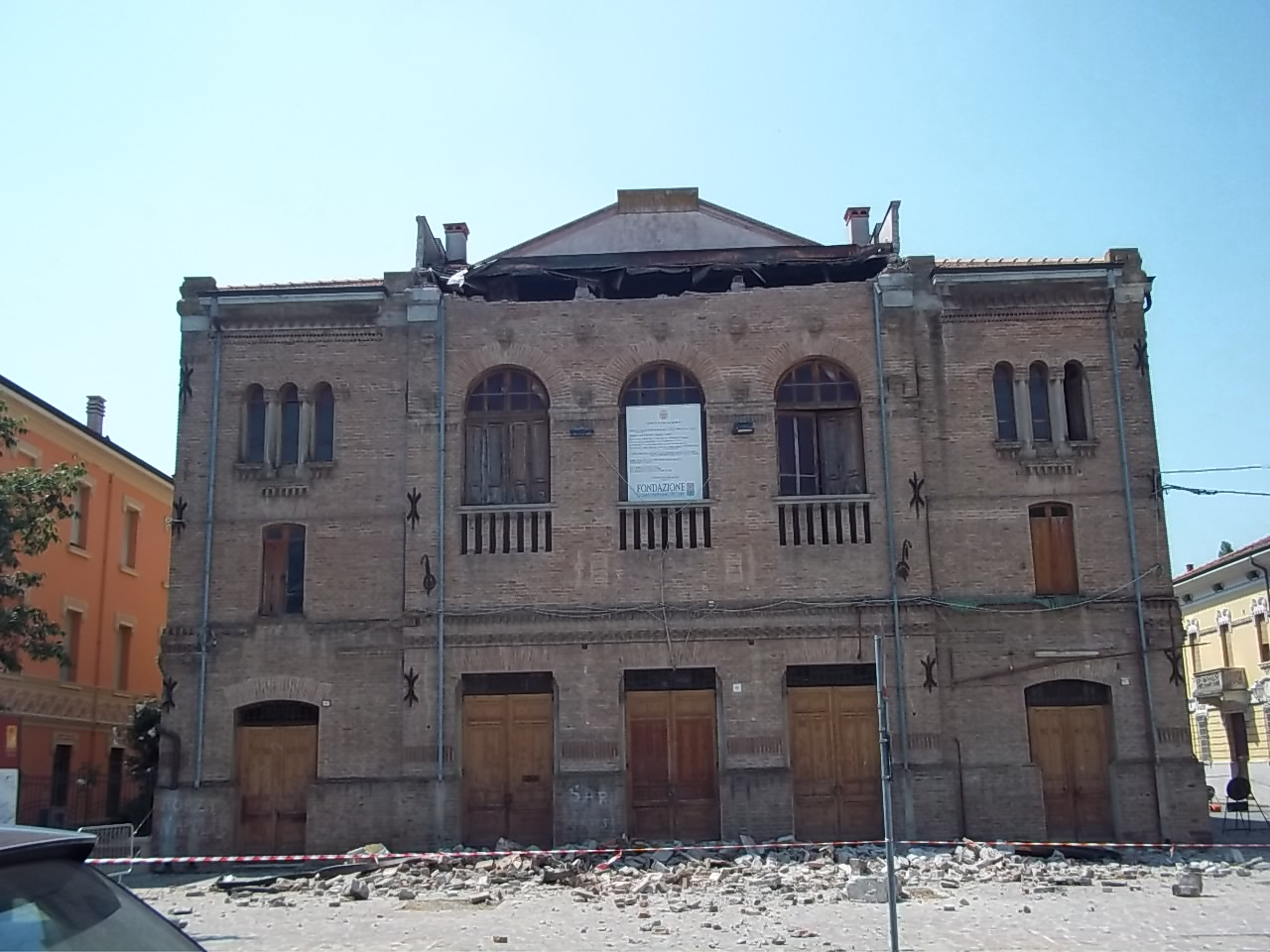 Teatro Sociale This is a photo of a monument which is part of cultural heritage of Italy.